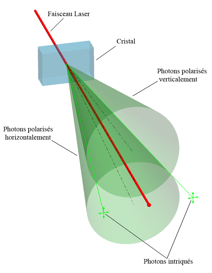 Rendu artistique de la génération d'une paire de photons intriqués par conversion descendante spontanée au fur et à mesure qu'un faisceau laser traverse un cristal non linéaire. Inspiré d'une image dans Dance of the Photons d'Anton Zeilinger.